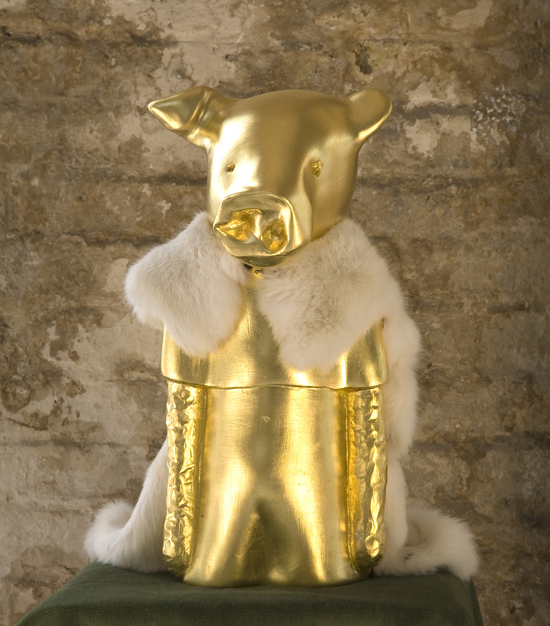 vergoldete Skulptur